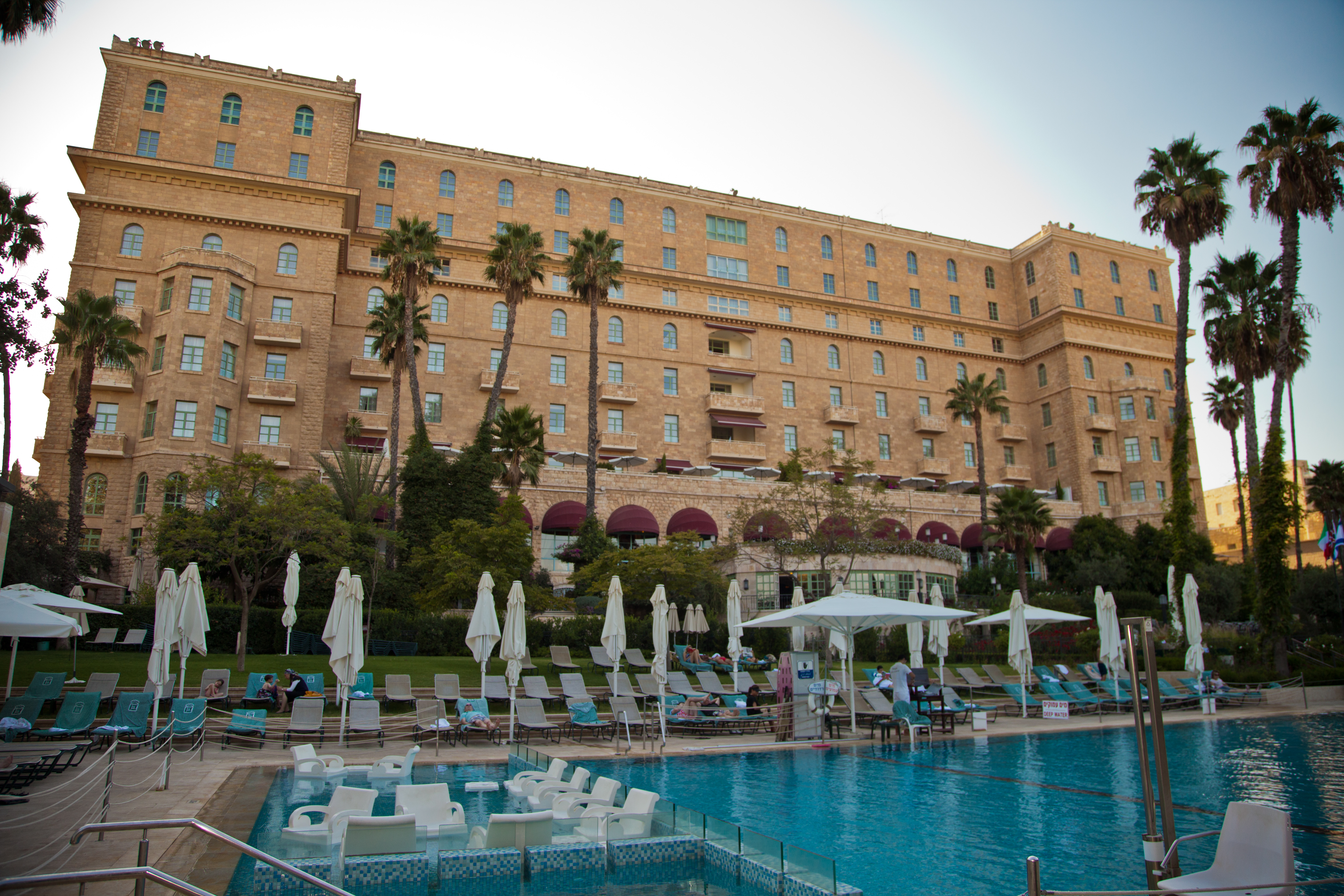 מלון המלך דוד